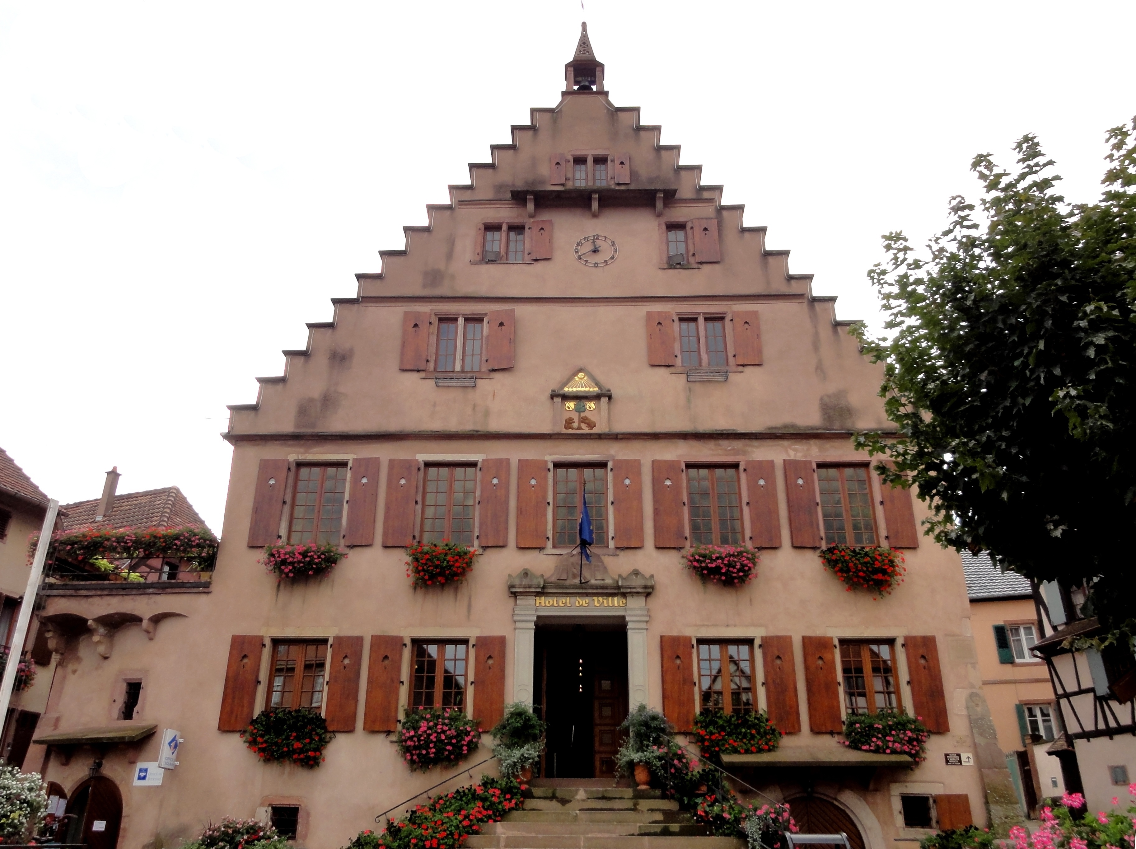 Alsace, Bas-Rhin, Hôtel de Ville de Dambach-la-Ville (1547), 11 place du Marché (PA00084681, IA00115189).